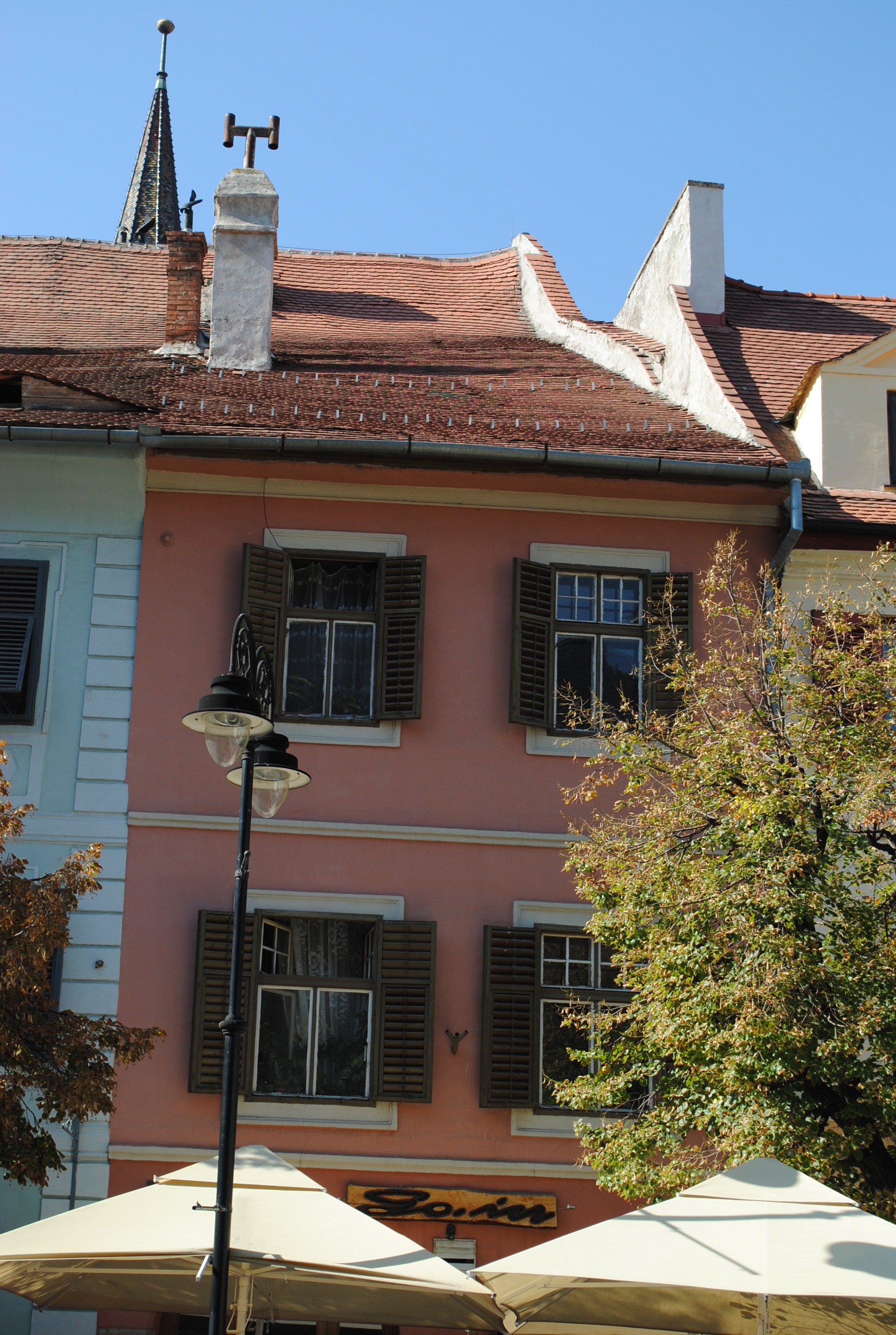 Casă, sec. XV - XVI, sf. XVIII